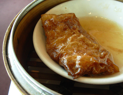 Tofu skin roll fu pei gyun